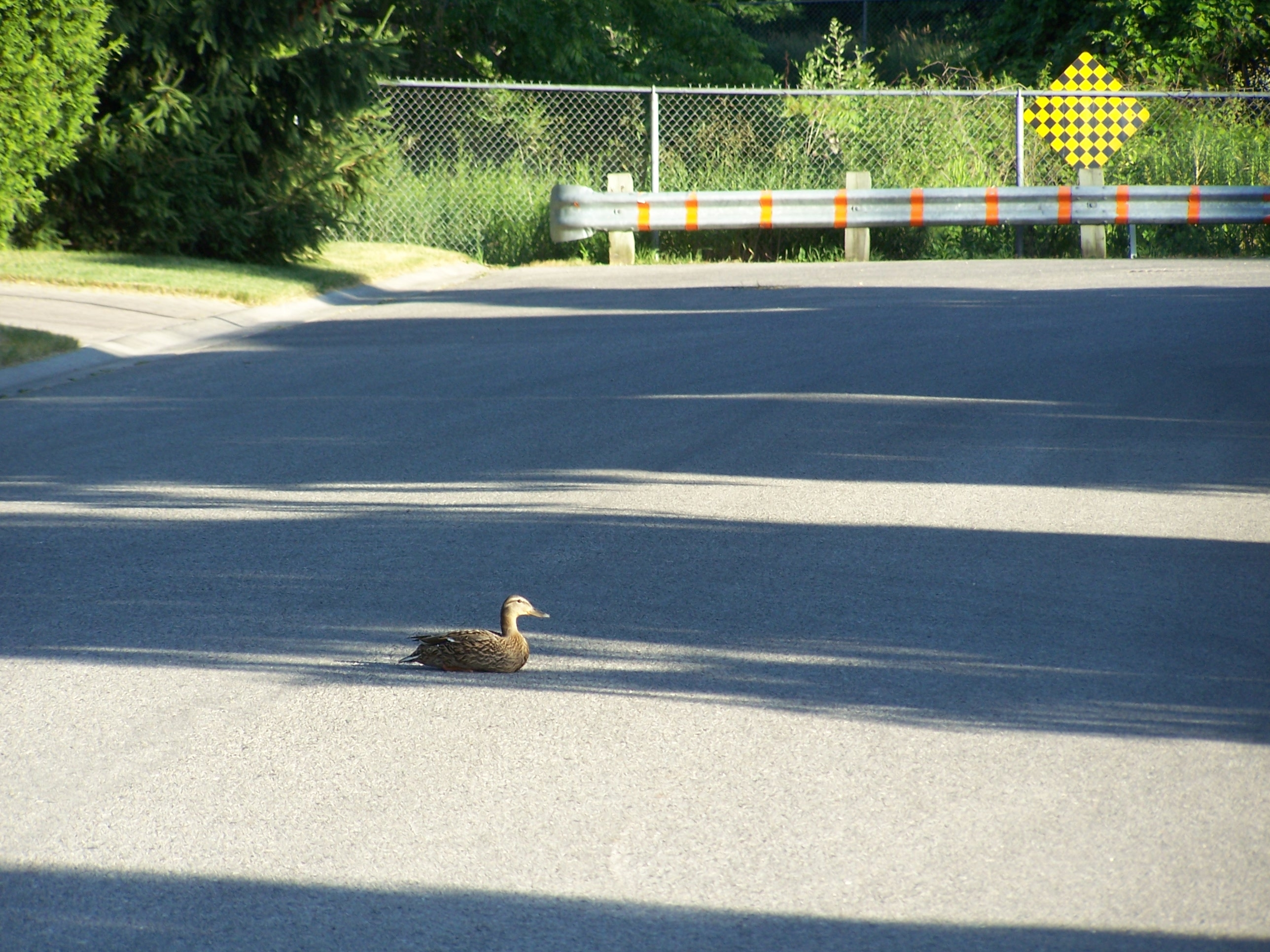 Anas platyrhynchos